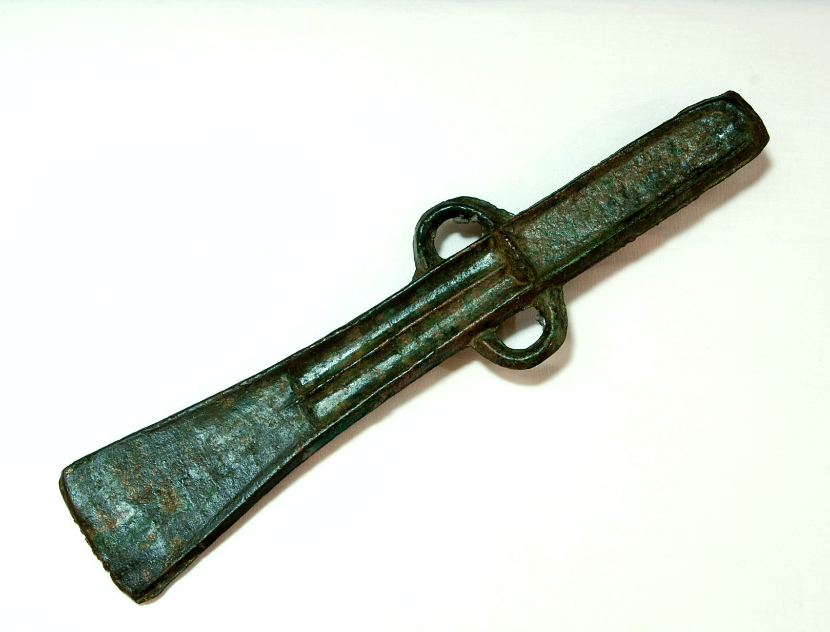 Hacha de doble anillo del Bronze Final